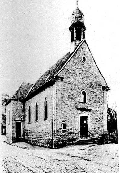 alte St. Matthäuskirche Gailbach